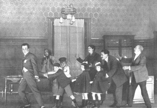 Escena de la obra de teatro Que viene mi marido, de Carlos Arniches